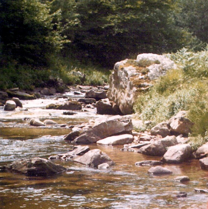 Poza de La Lancha, río Híjar, 1973, Pino.